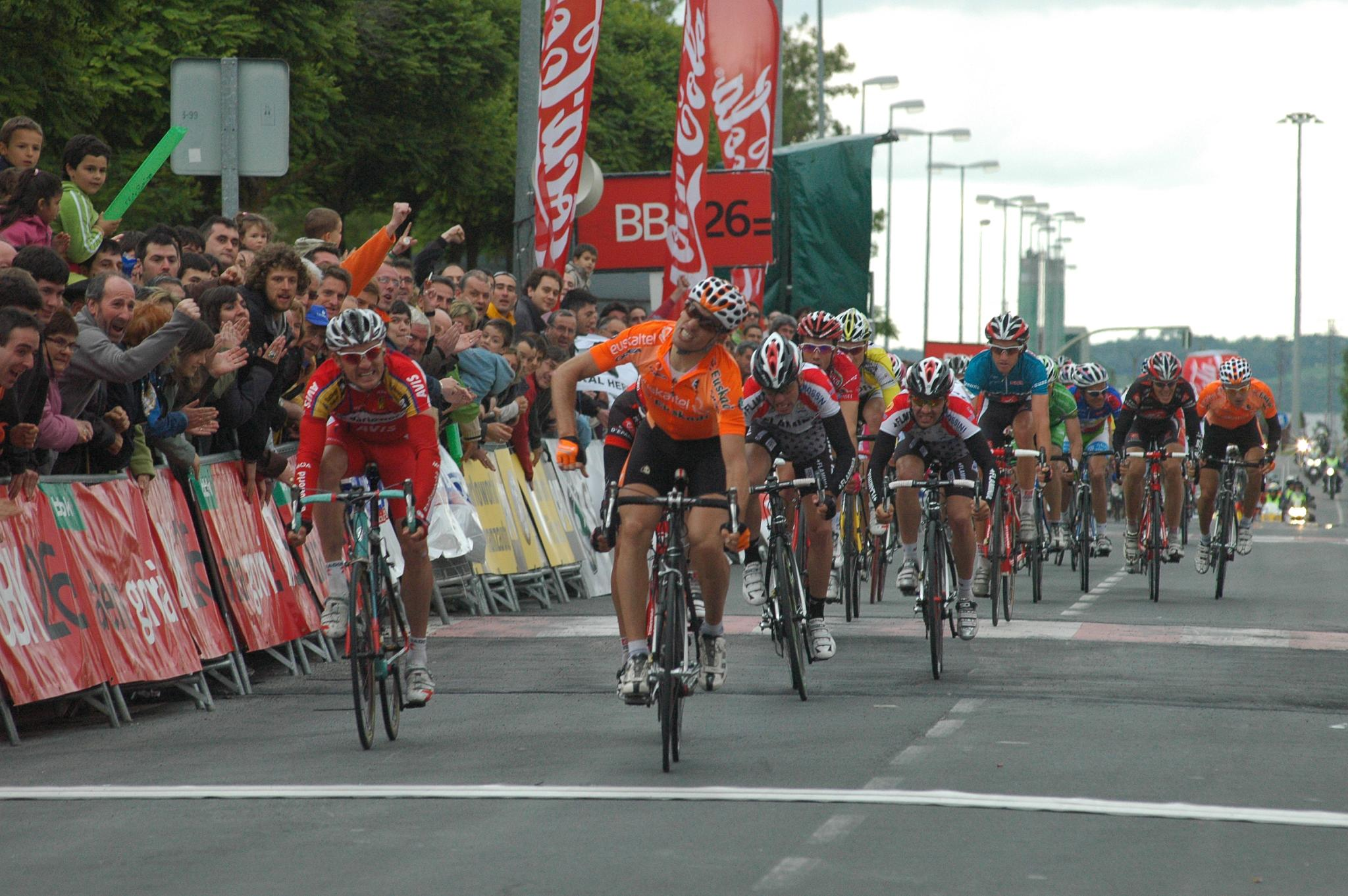 Koldo FERNANDEZ DE LARREA (EUSKALTEL-EUSKADI) entrando vencedor en la Meta de Salvatierra (Álava, España). Euskal Bizikleta 2008